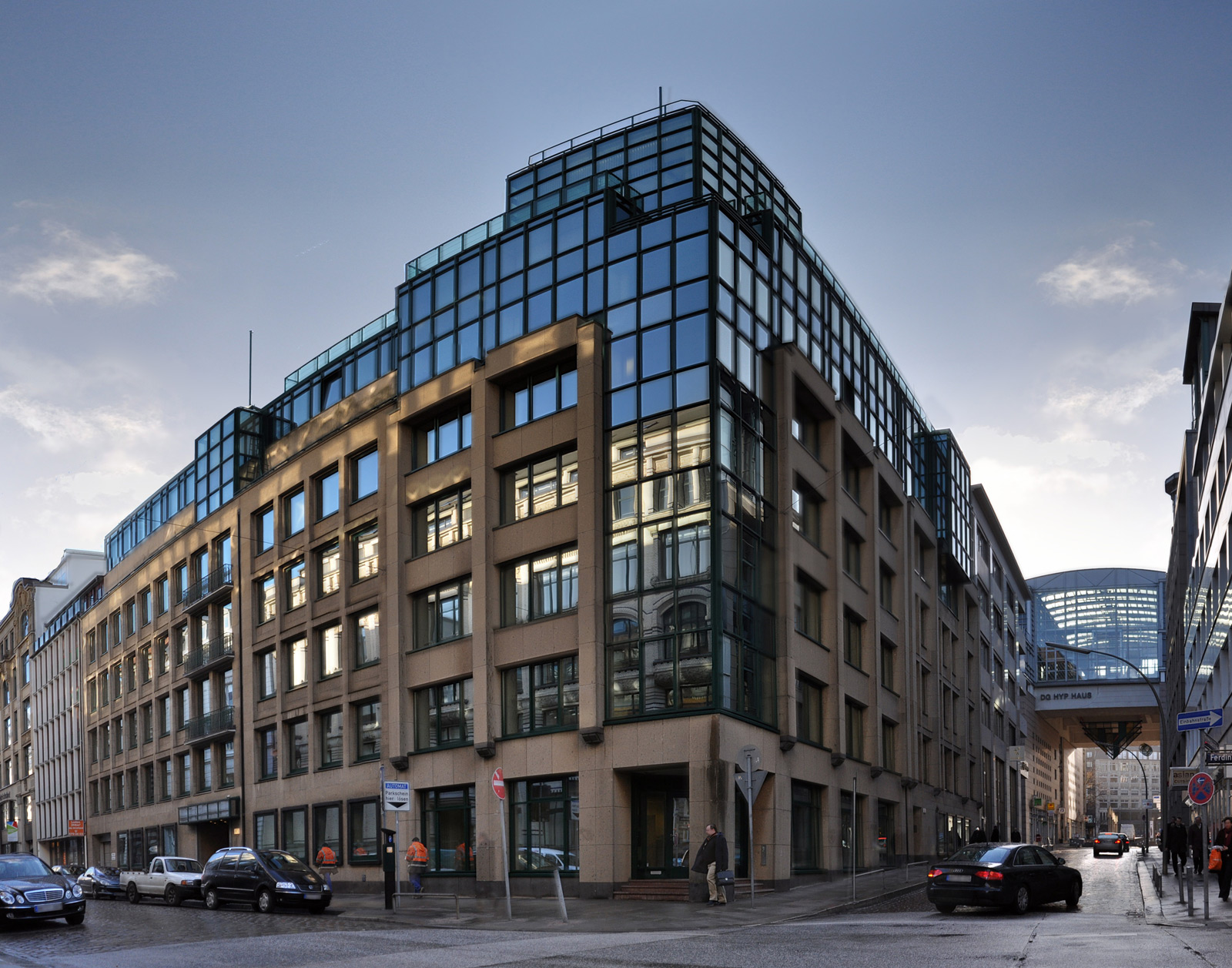 Bürogebäude der Biesterfeld AG in Hamburg